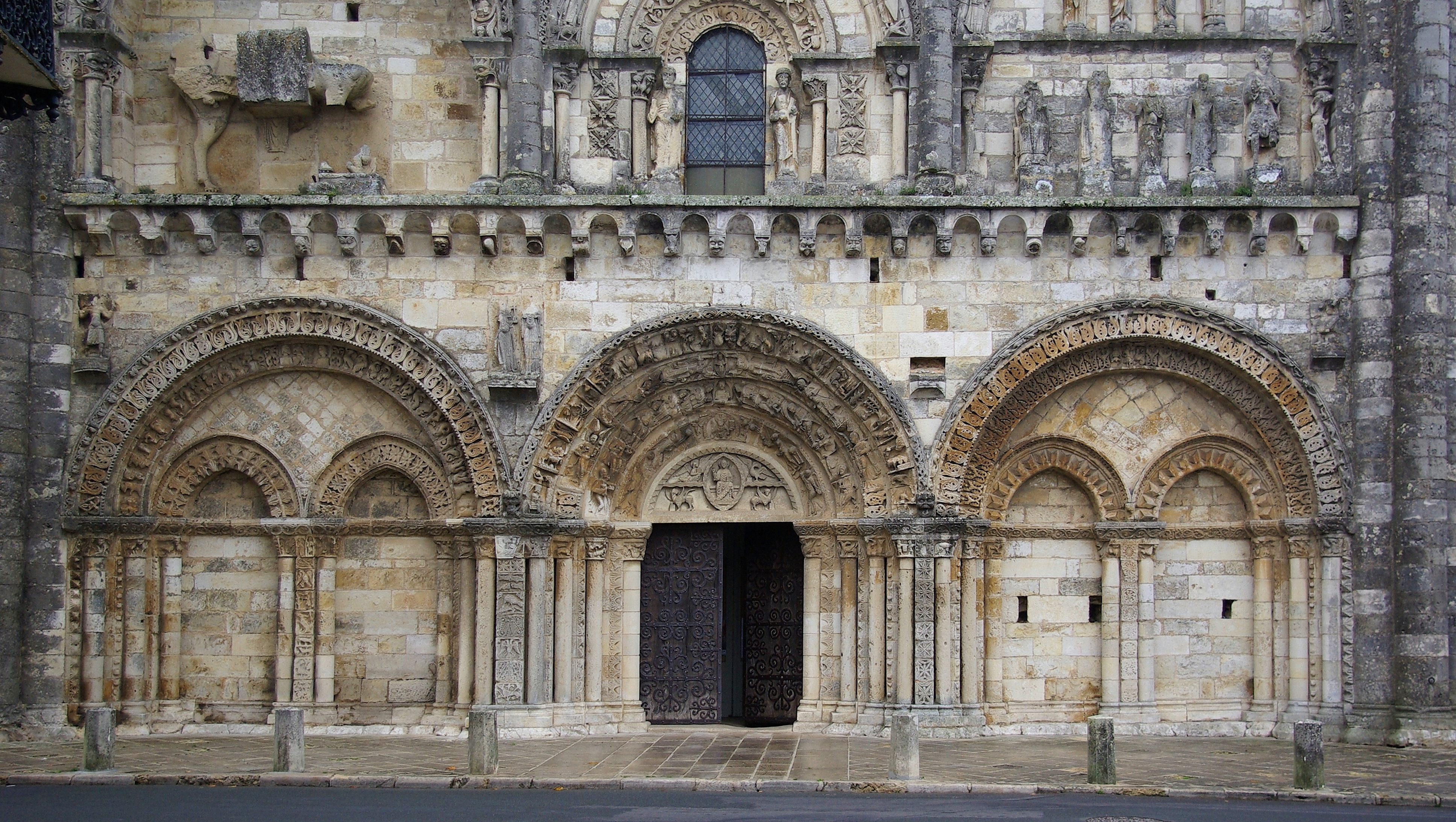 Façade de l'église Saint-Nicolas de Civray, Vienne, France (vue partielle).